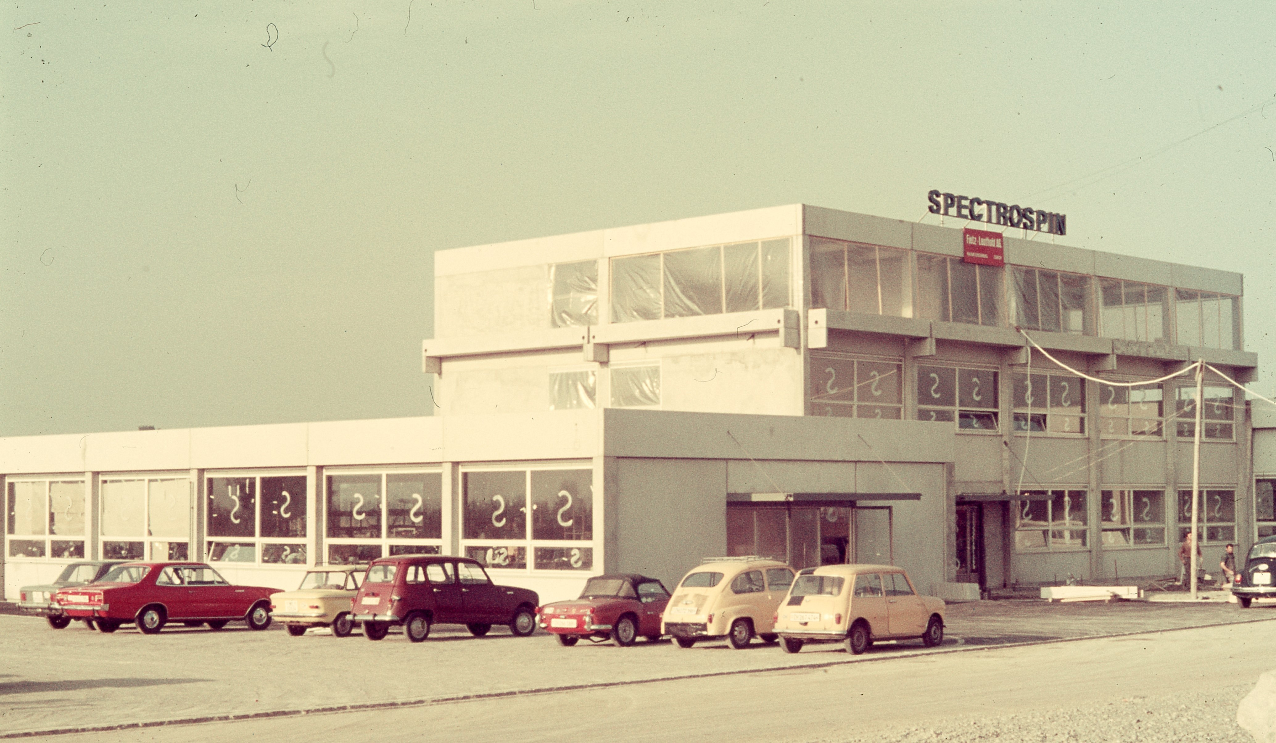 Architektur